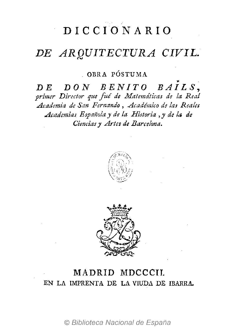 Diccionario de arquitectura civil, obra póstuma de Benito Bails Autor: Bails, Benito Fecha: 1802 Datos de edición: Madrid, Imprenta de la Viuda de Ibarra